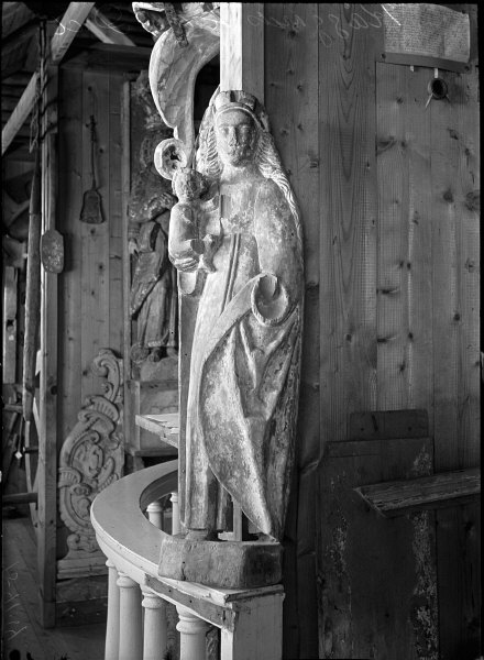 Träskulptur, ask. Madonnan med barnet. 1400-talet. Kategori: (05) SkulpturerTräskulptur, ask. Madonnan med barnet. 1400-talet.